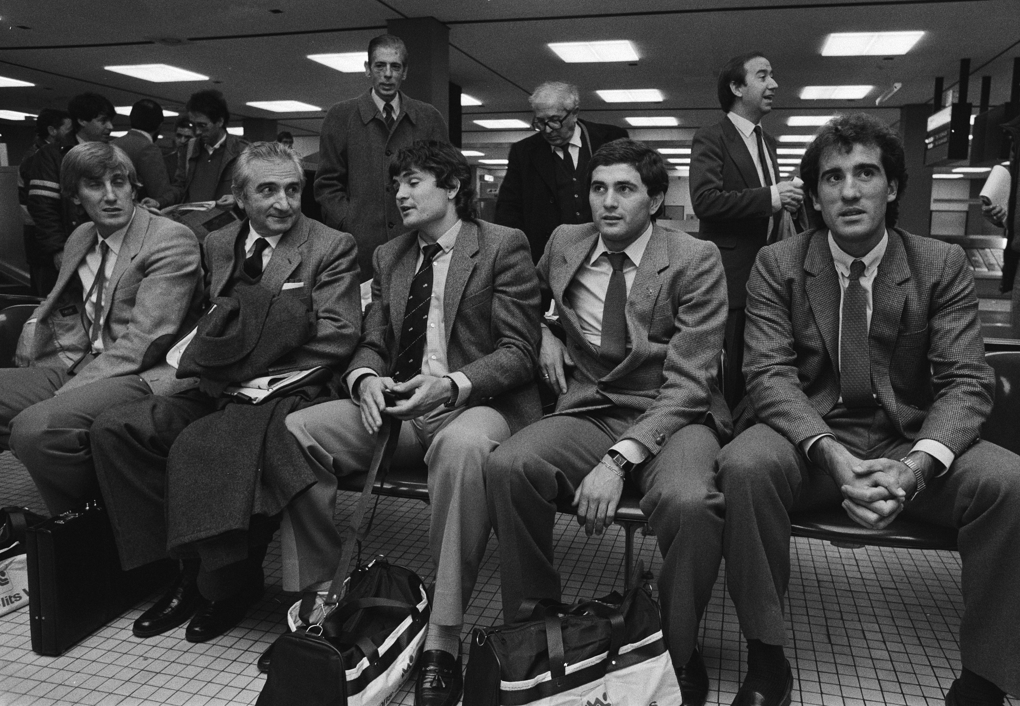 Maceda, Muñoz, Camacho, Gordillo en Goikoetxea op Schiphol voor de interlands tussen Nederland en Spanje